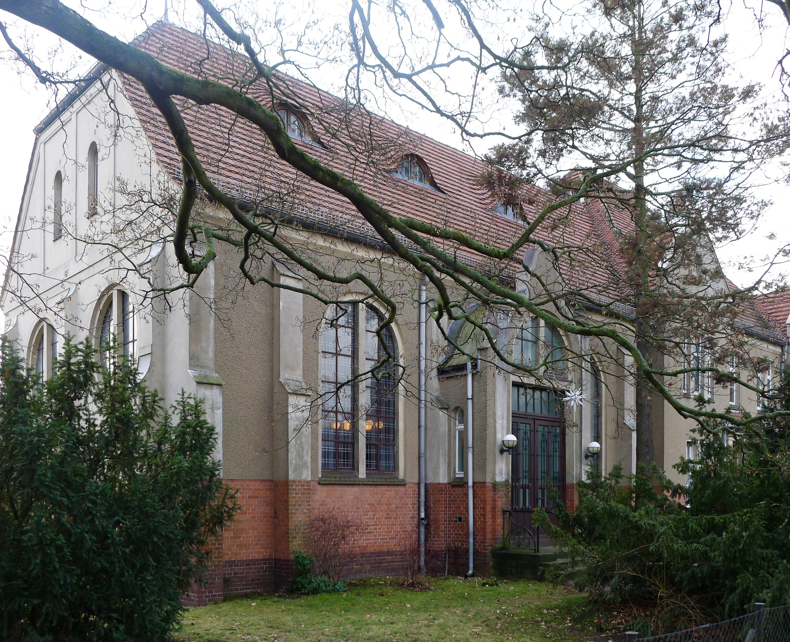 Kirchsaal von außen